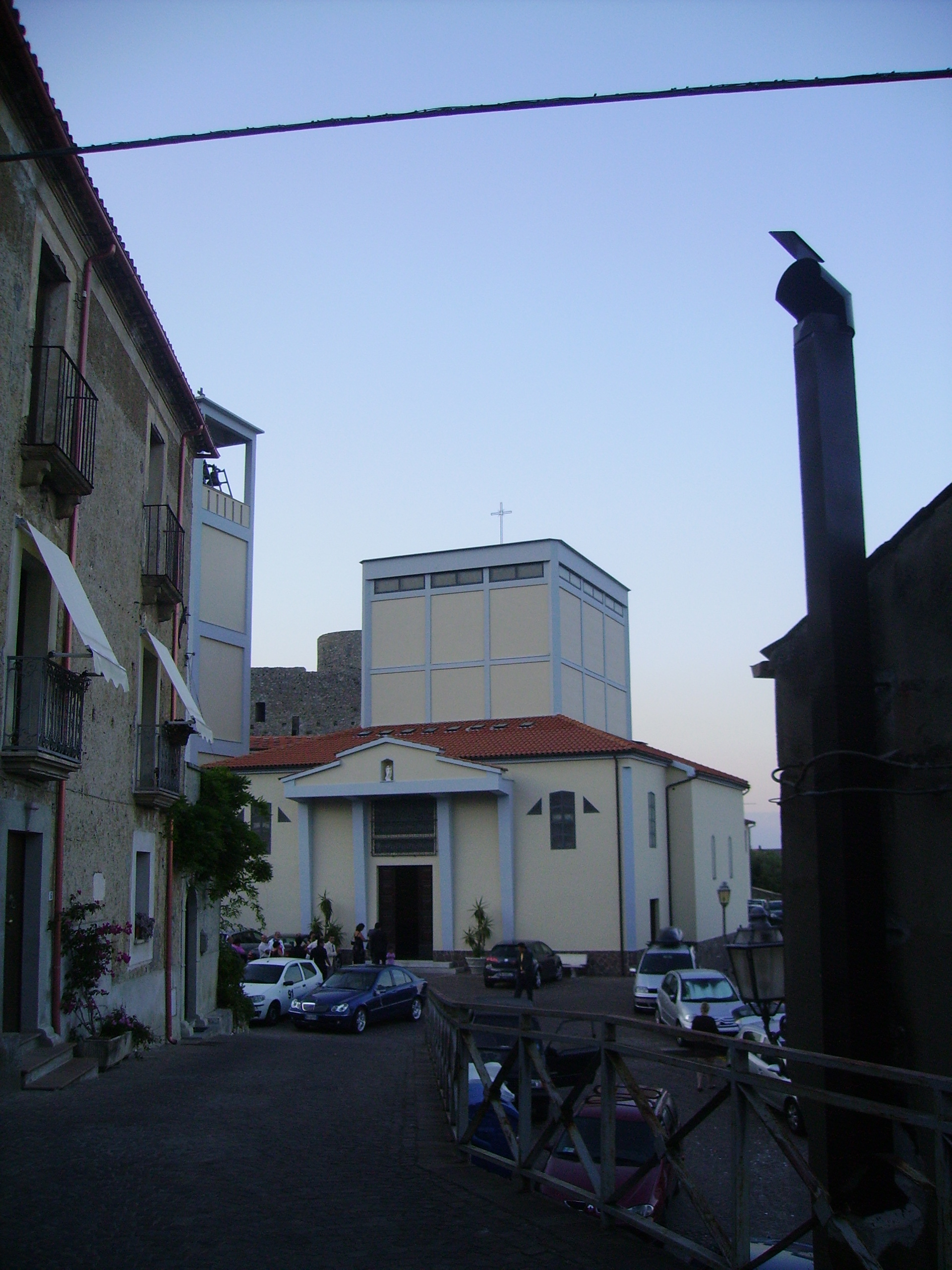 Chiesa Madre di Malvito (CS)